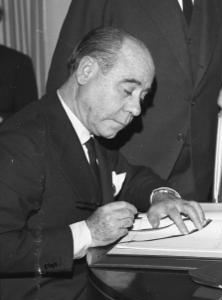 Unterzeichung des deutsch-spanischen Akommens über die Wanderung, Anwerbung und Vermittlung von spanischen Arbeitnehmern nach der Bundesrepublik Deutschland durch den Spanischen Botschafter Marqués de Bolarque und Staatssekretär van Scherpenberg am 29. März 1960 im Auswärtigen Amt Unterzeichner: Der spanische Botschafter Marqués de Bolarque und Staatssekretär van Scherpenberg Im Hintergrund: Botschaftsrat Araneguí, eine Dolmetscherin, Herr Sorribes, Ministerialdirektor Dr. Janz, VLR Hoffmann, Ministerialdirigent Ehmke (Bundesministerium für Arbeit und Sozialordnung)